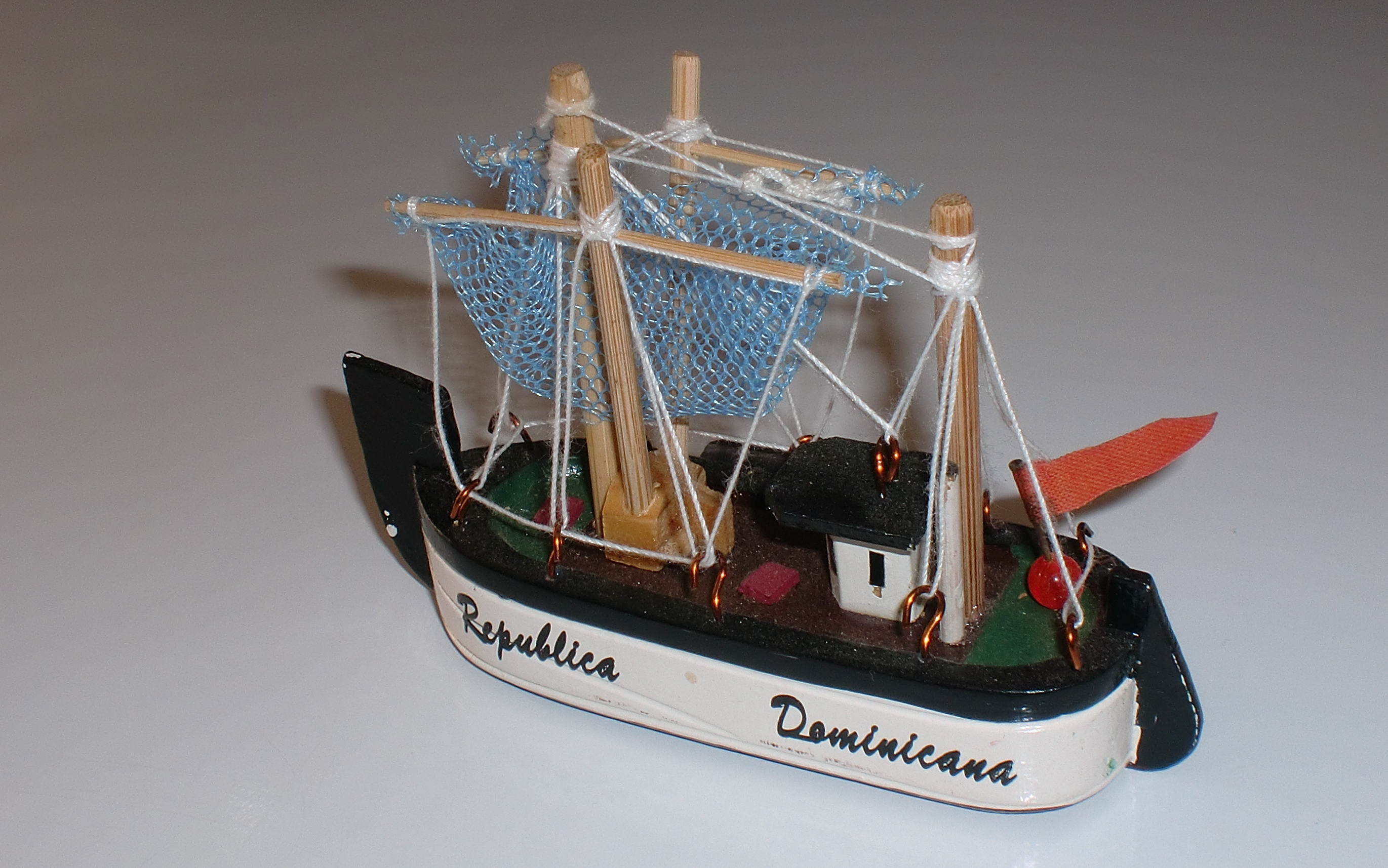 Souvenir de República Dominicana: un imán para heladera en forma de barquito